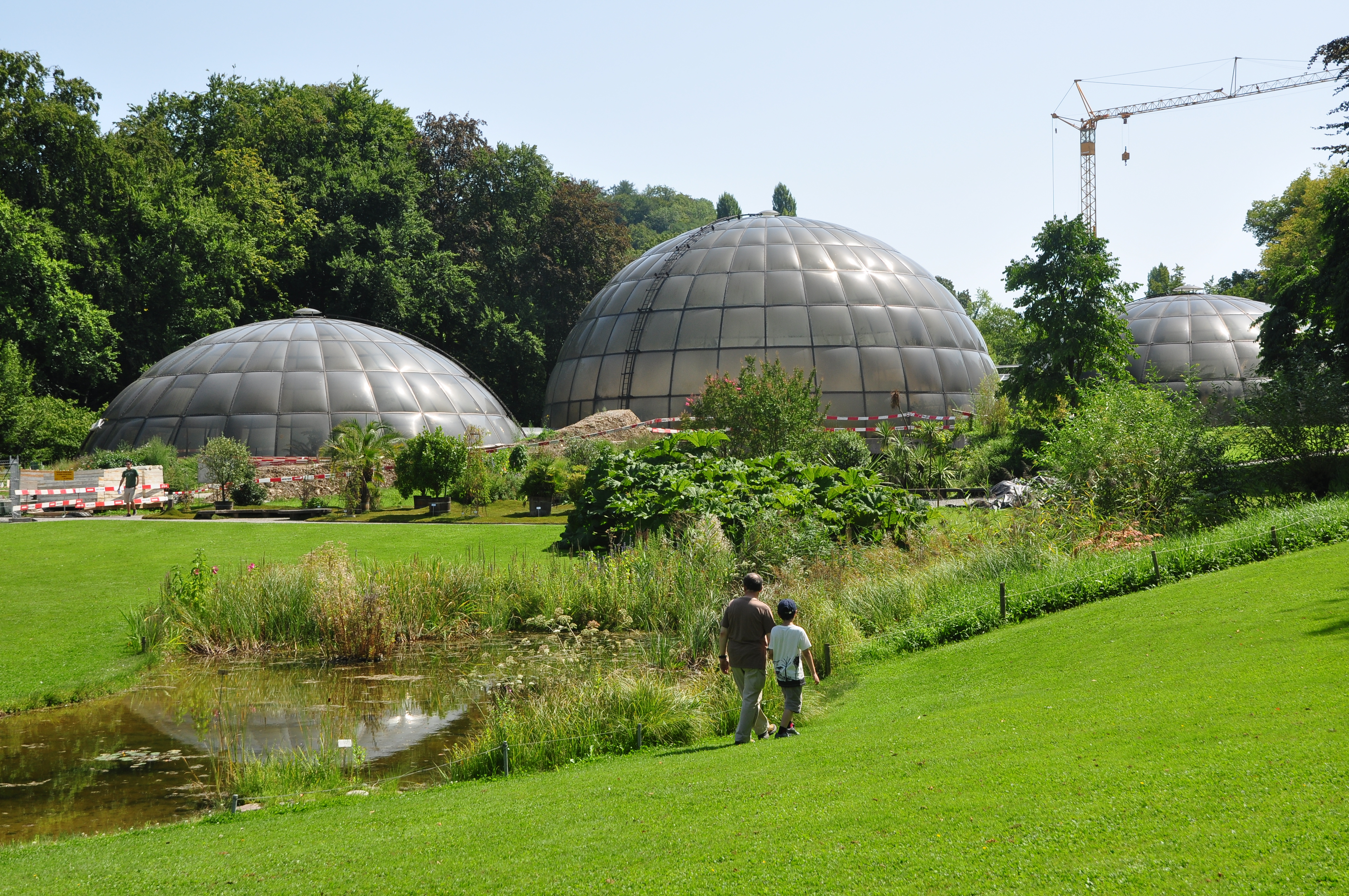 Botanischer Garten der Universität Zürich in Zürich-Weinegg (Switzerland)